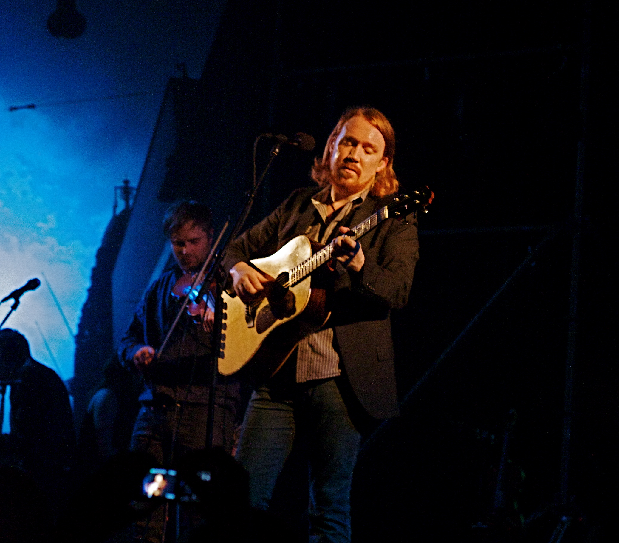 Lars Winnerbäck